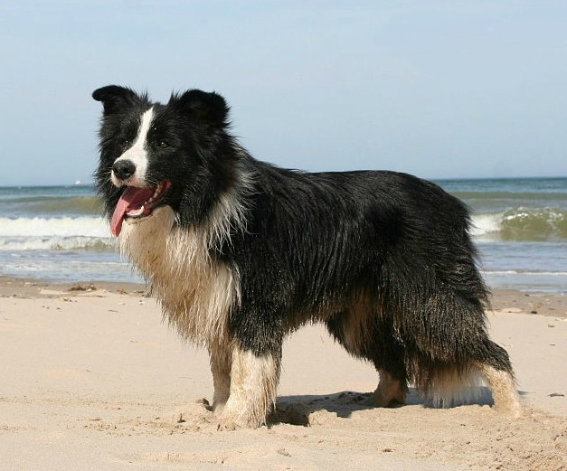 L'élevage de Grimmauprès se situe en Belgique, 0(032)475 225543